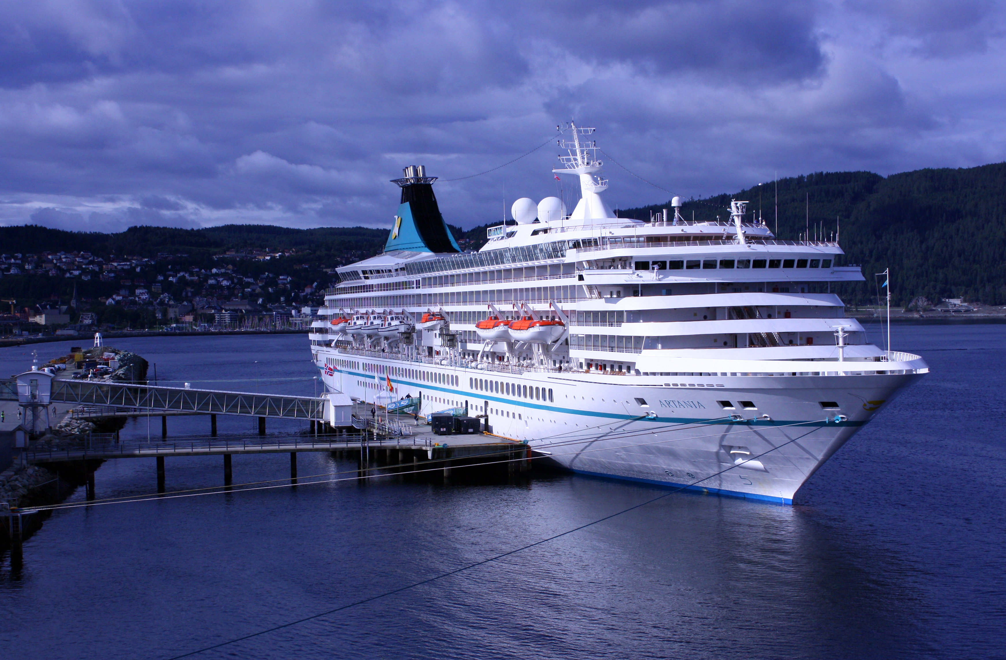 MV Artania in Trondheim.